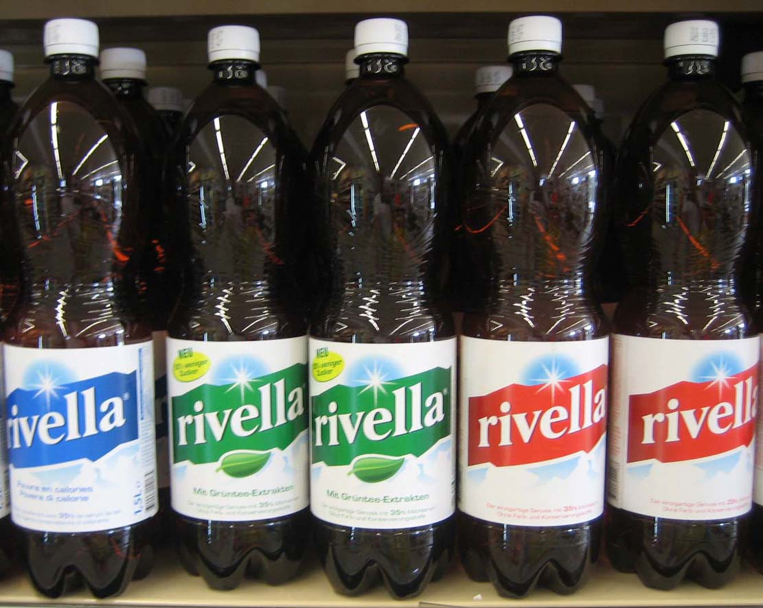 Rivella_blau_grün_rot